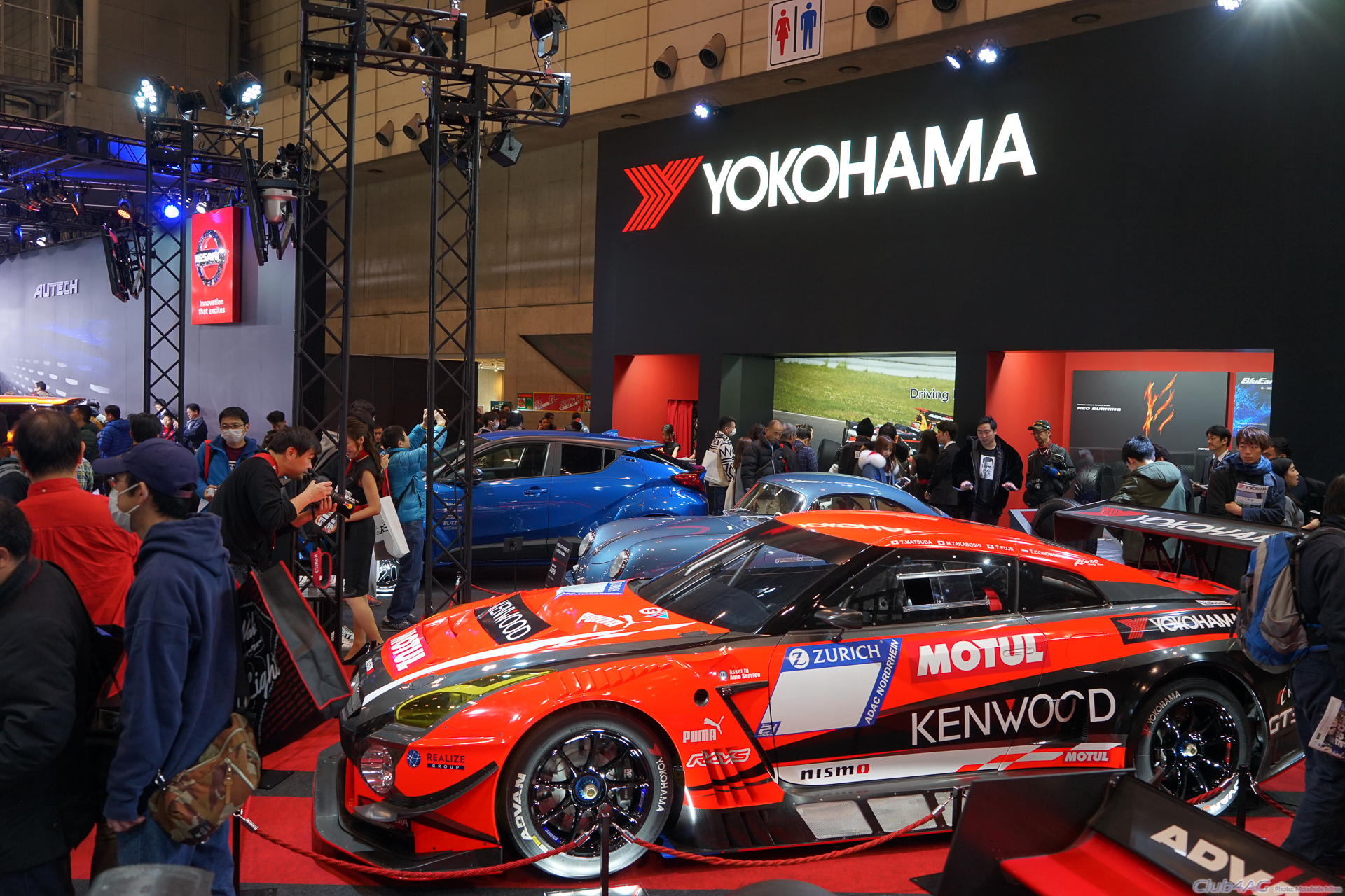 Tokyo Auto Salon 2019